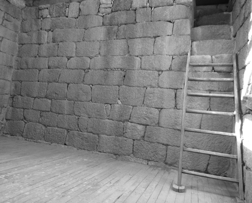 planta superior